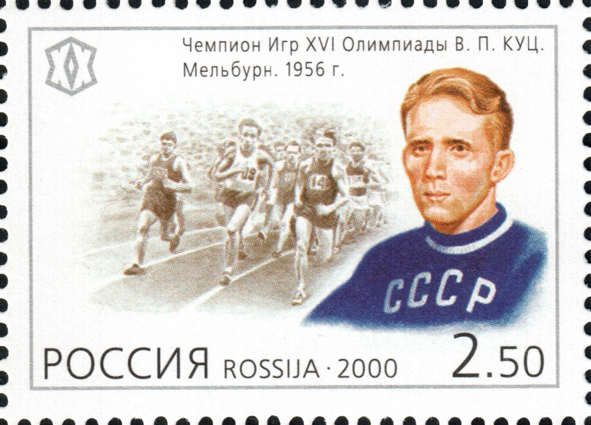 Vladimir Kuts